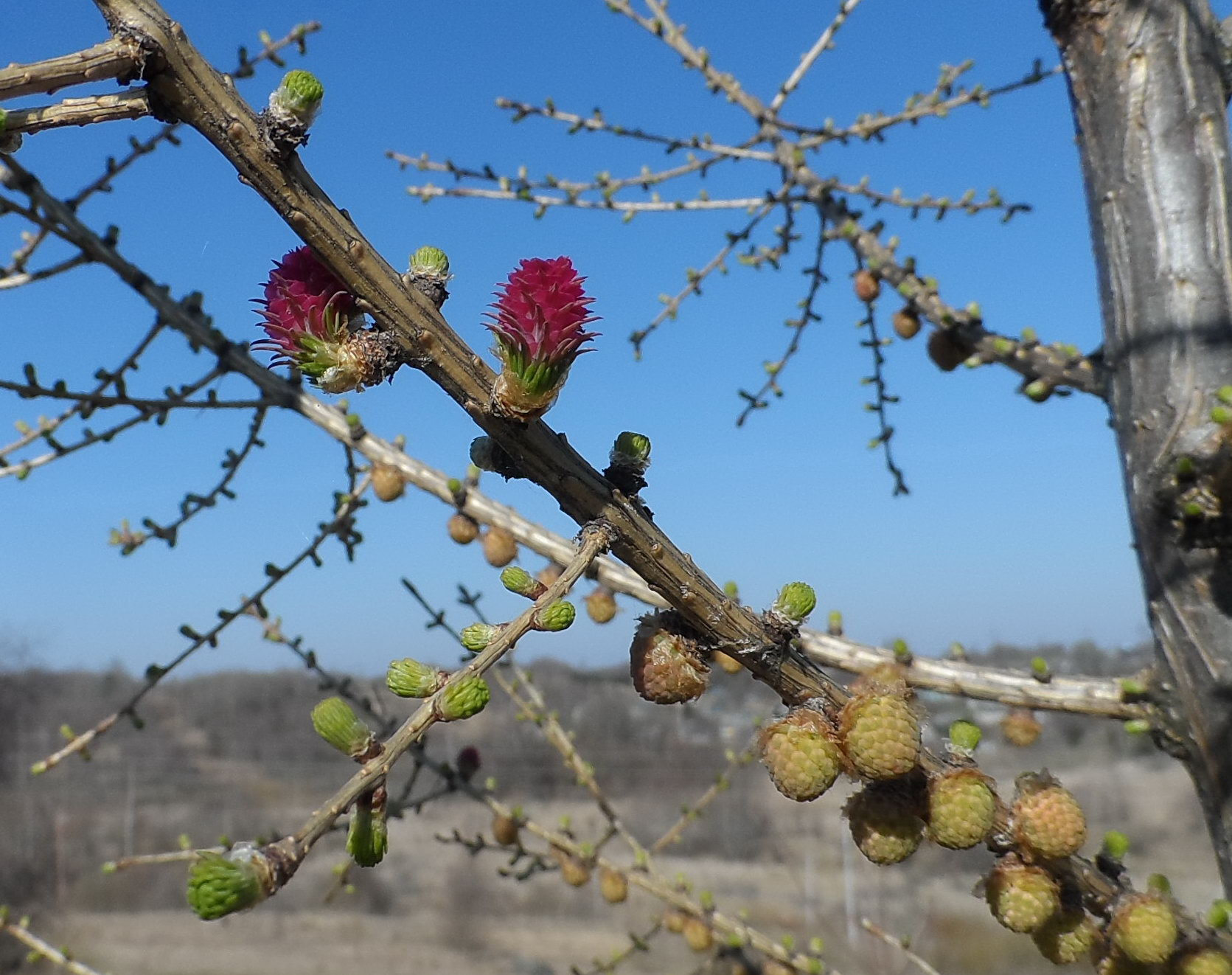 Шишки и колоски лиственницы весной